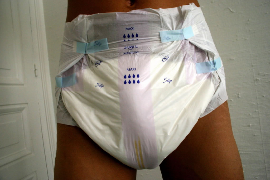 Medelålders man med urin och avföringsinkontinens bär alltiettblöjan Tena Slip.